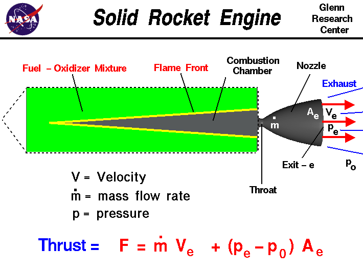 Solid Rocket engine